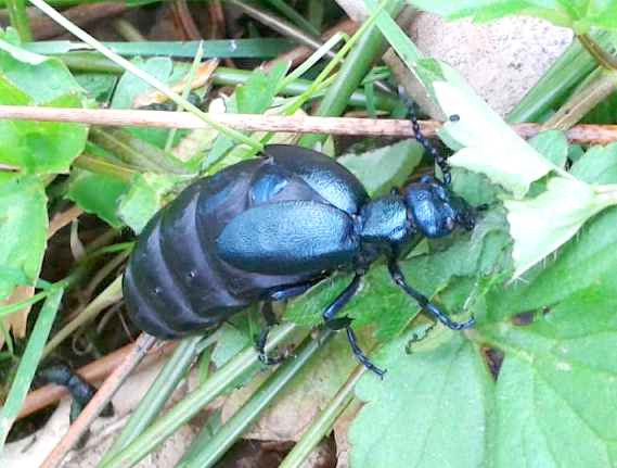 Meloe violaceus oder Meloe proscarabaeus in der Nähe von Mindelaltheim